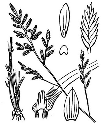 Catapodium rigidum subsp. hemipoa